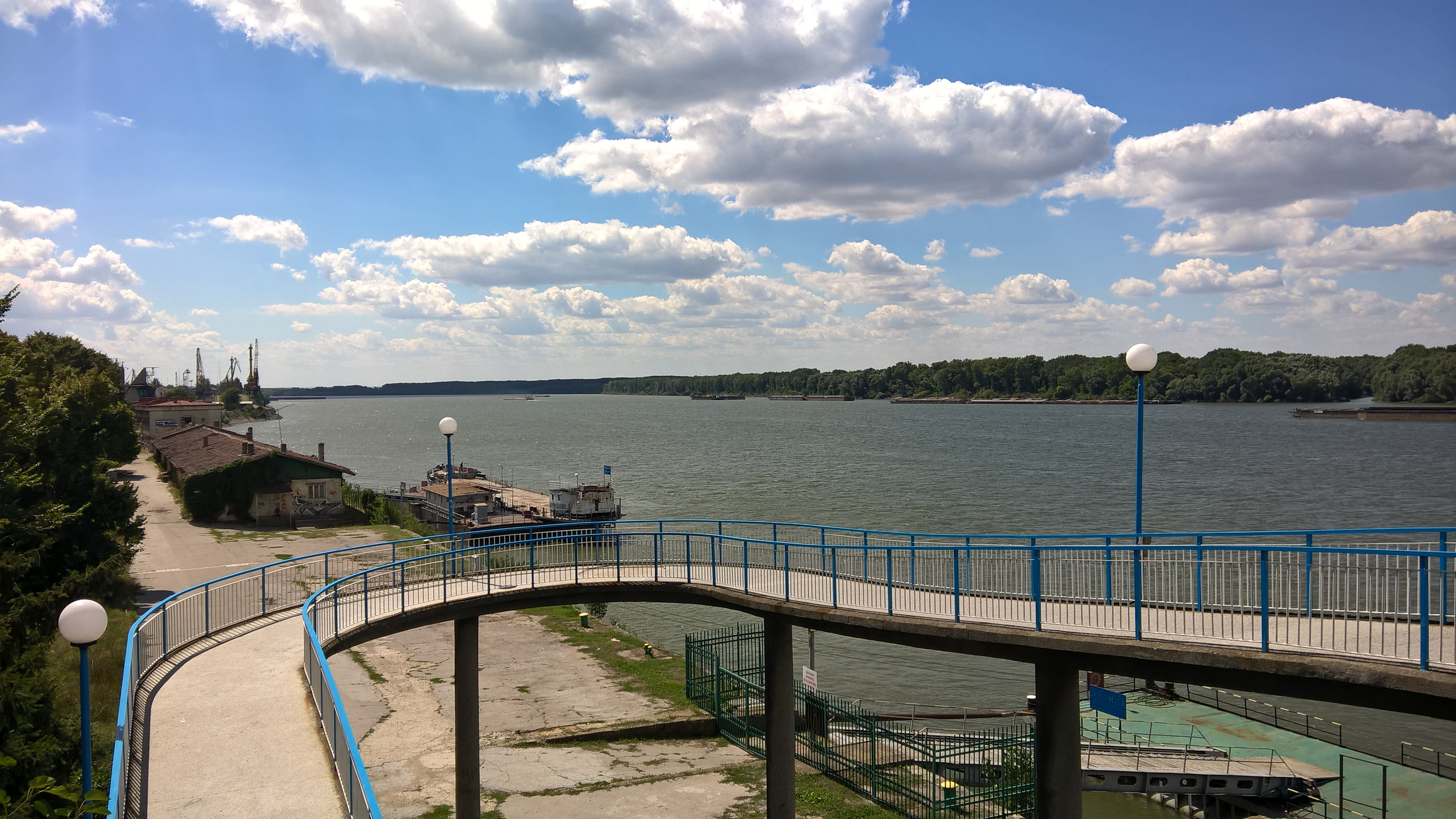 Пристанът